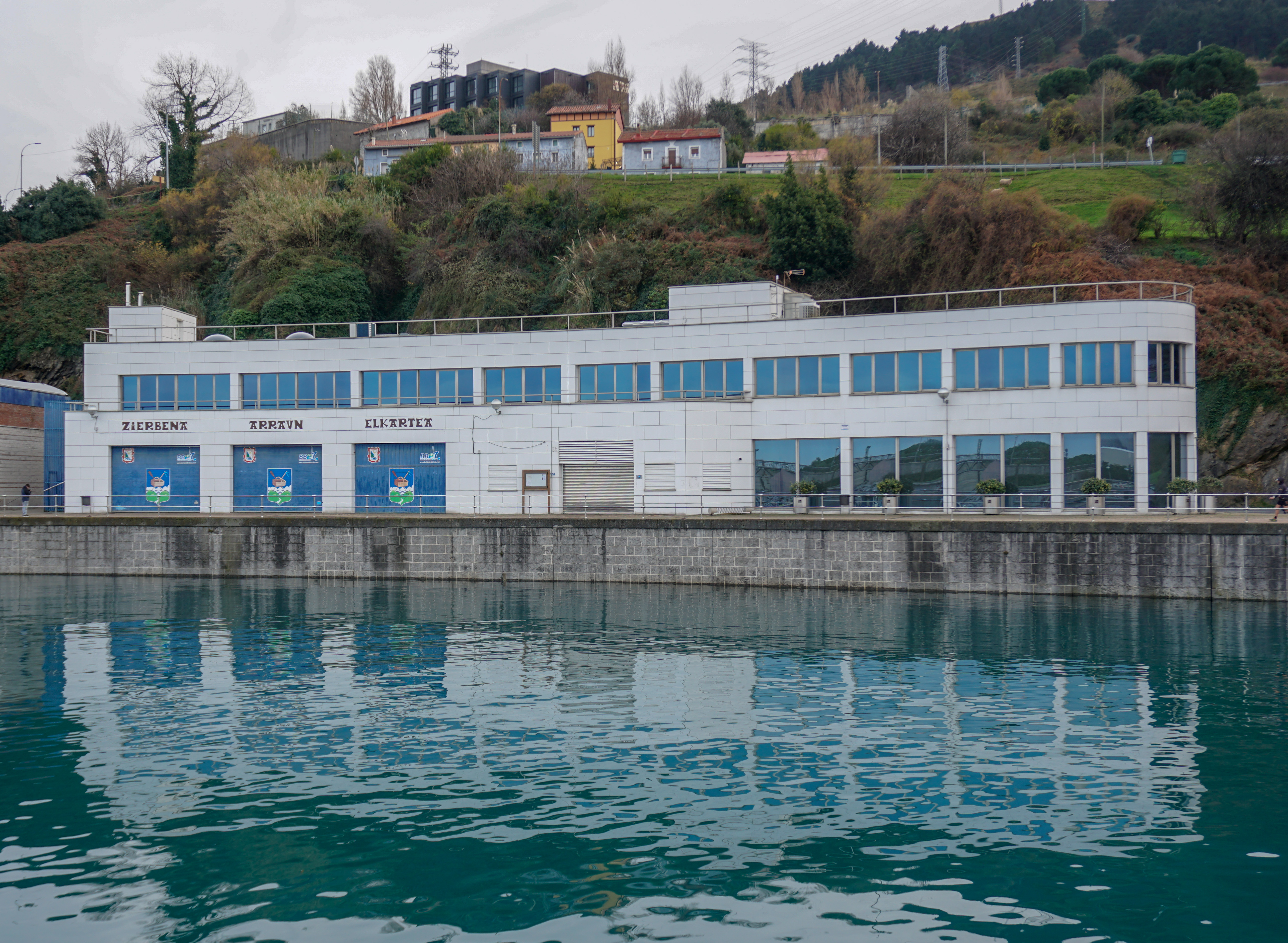 Instalaciones del Club de Remo Ciérvana